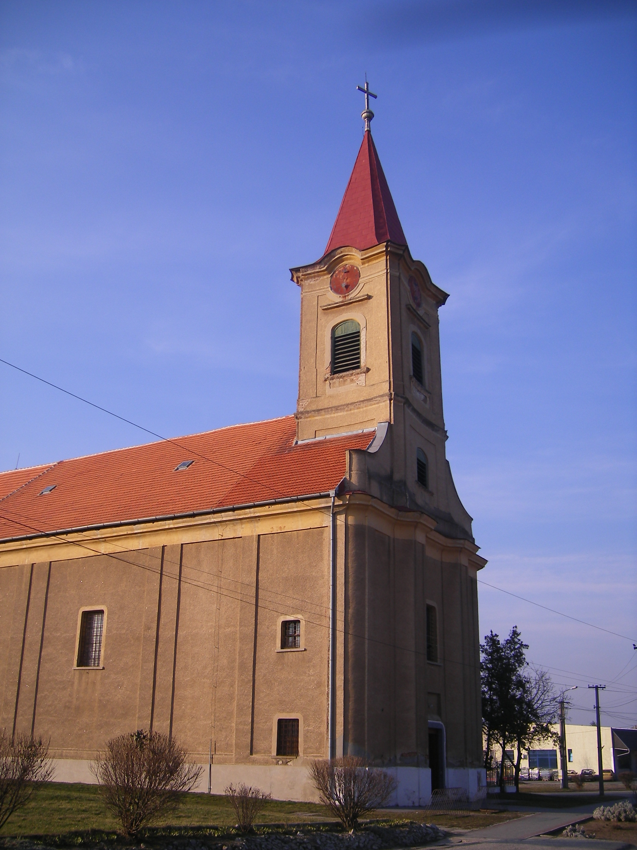 Izsa - katolikus templom